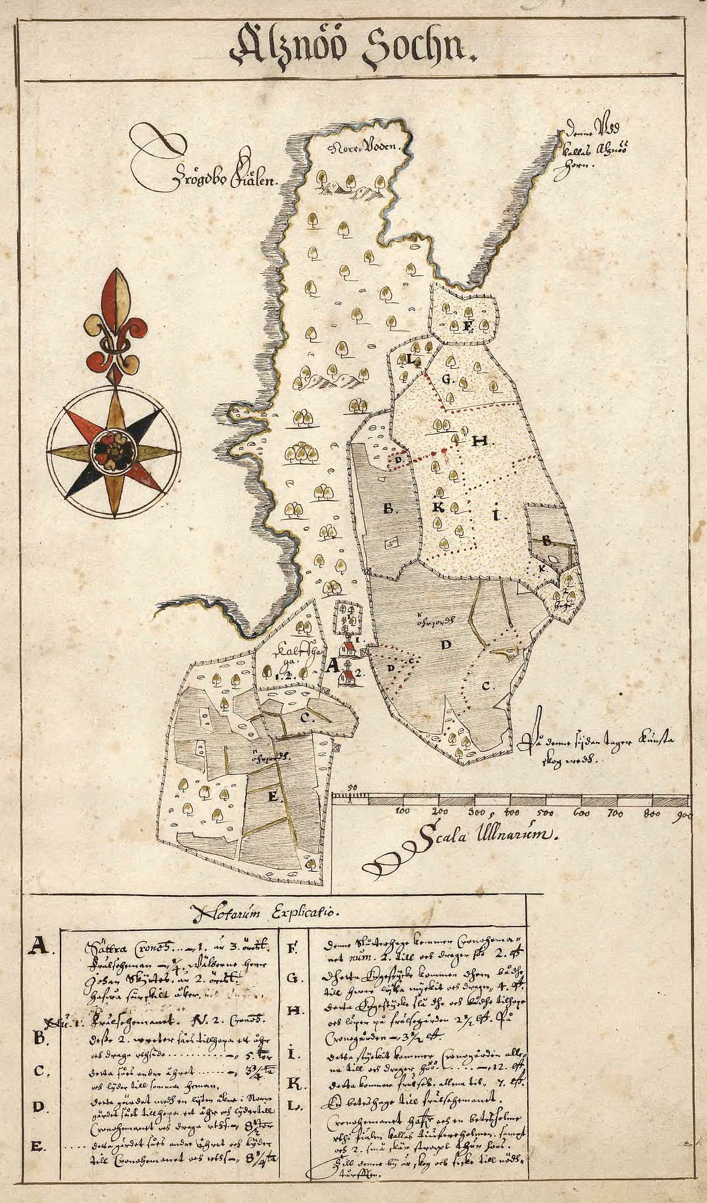 Geometrisk avmätning över egendomen Sättra på norra Adelsö